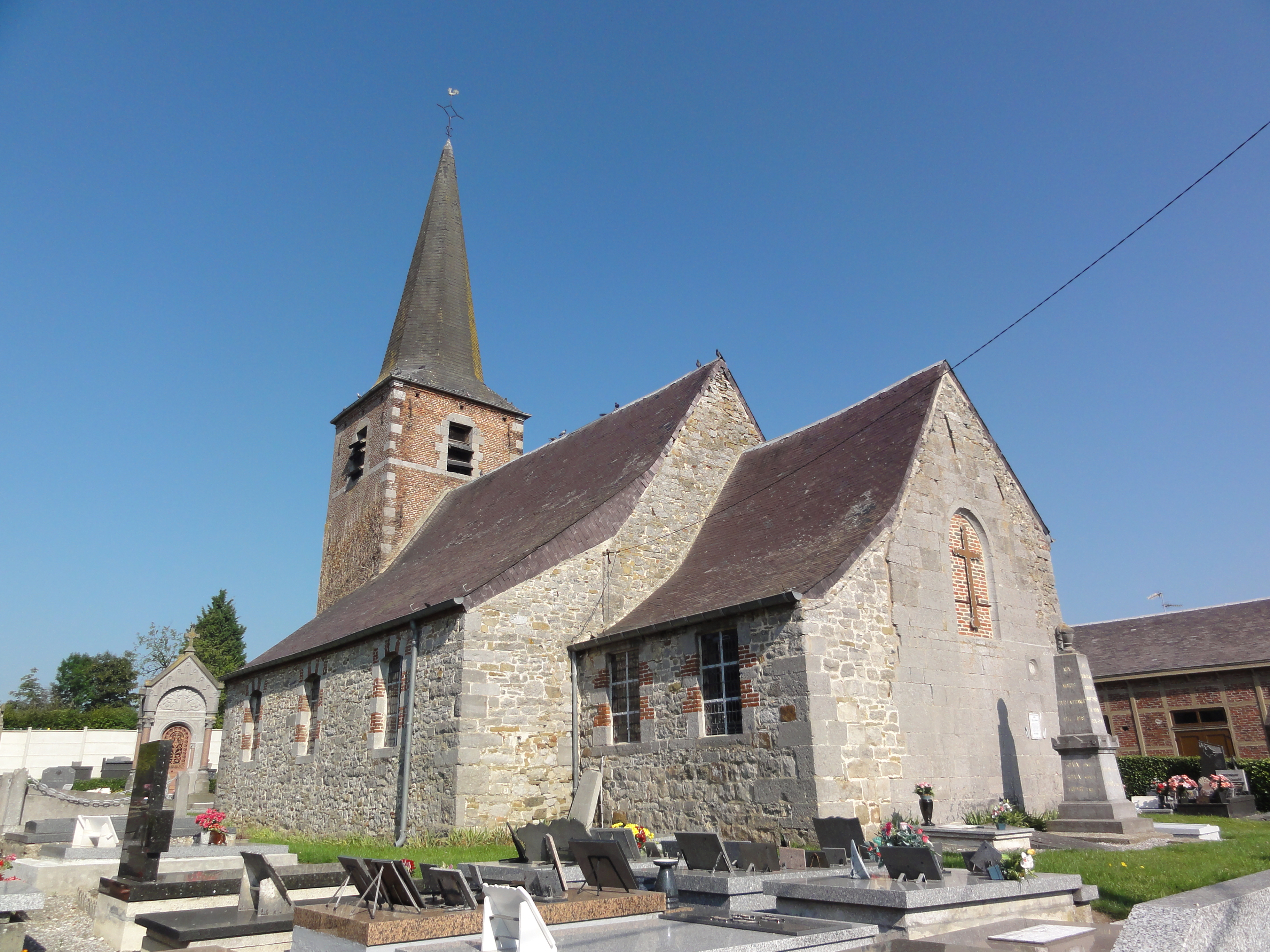 Bérelles (Nord, Fr) église